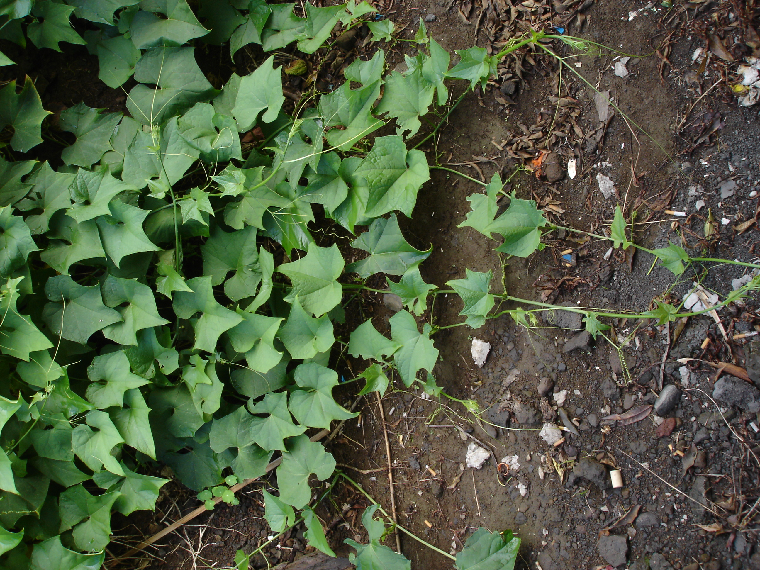 Description: Chouchou, Sechium edule, novembre 2004, La Réunion Source: Bouba